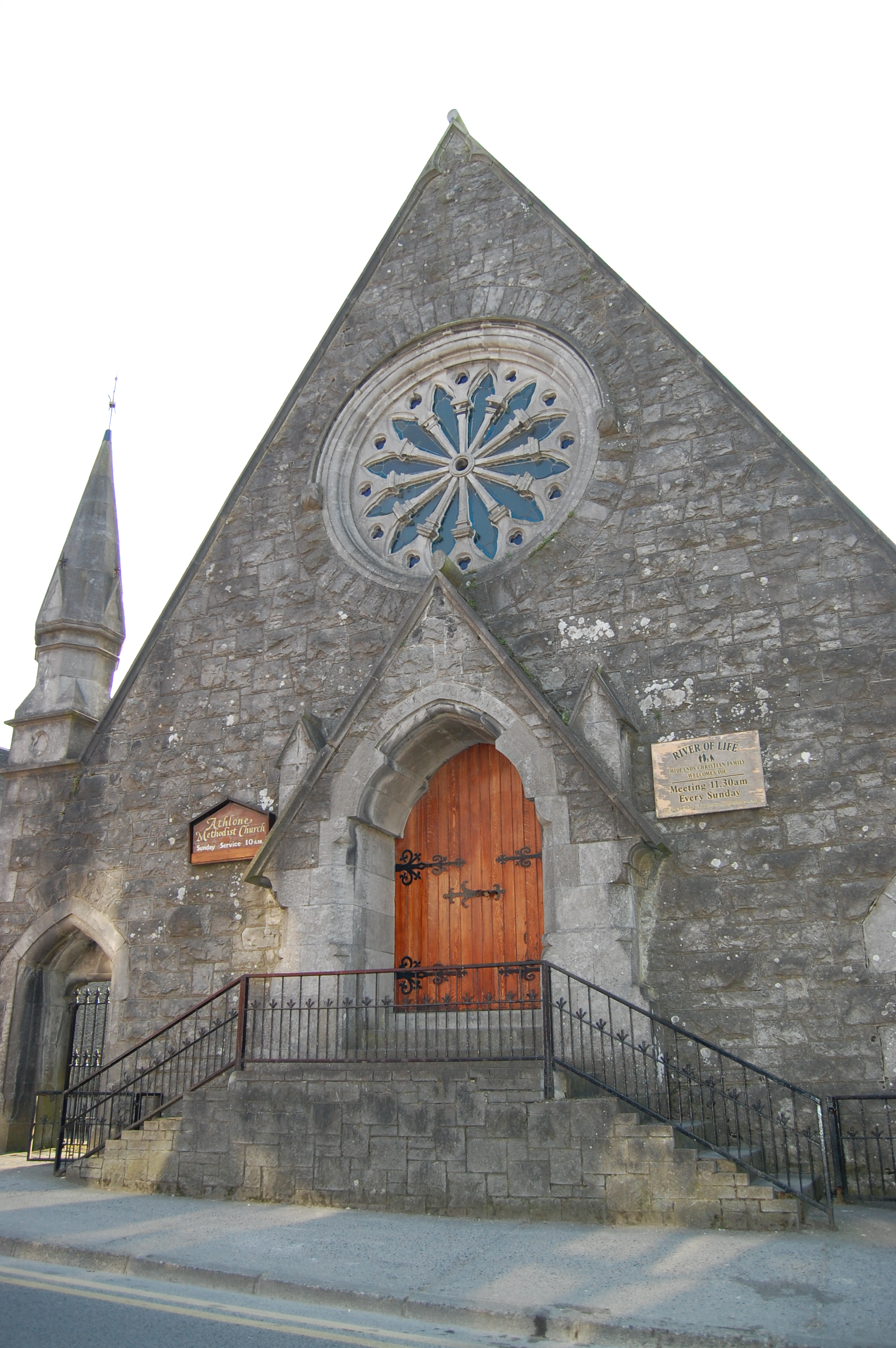 Uma capela em Athlone, Irlanda.